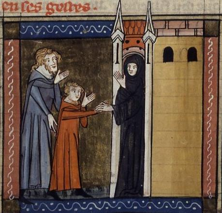 (Saint Marina the Monk presented to the monastery(Sainte Marine présentée au monastère. Cote : Français 241 , Fol. 139v.)